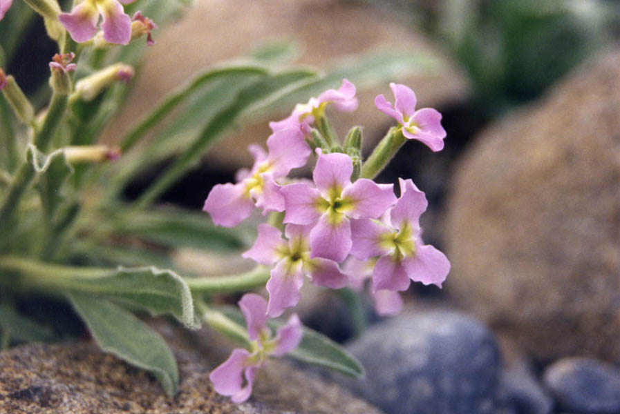 Matthiola fruticulosa subsp. perennis (Syn. Matthiola scapifera , Matthiola perennis)